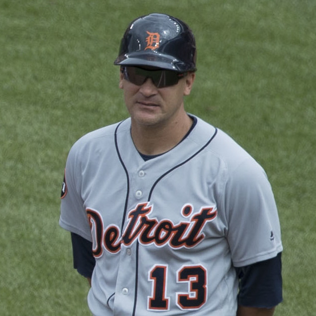 Tigers at Orioles 8/6/17